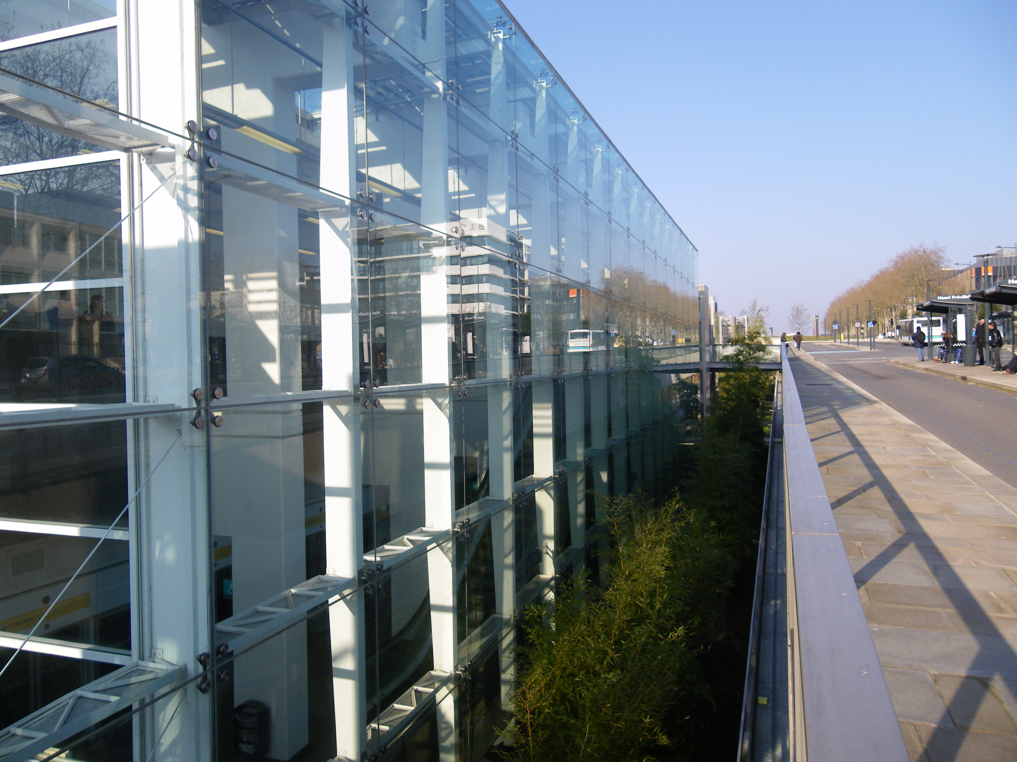 la station de metro freville a rennes